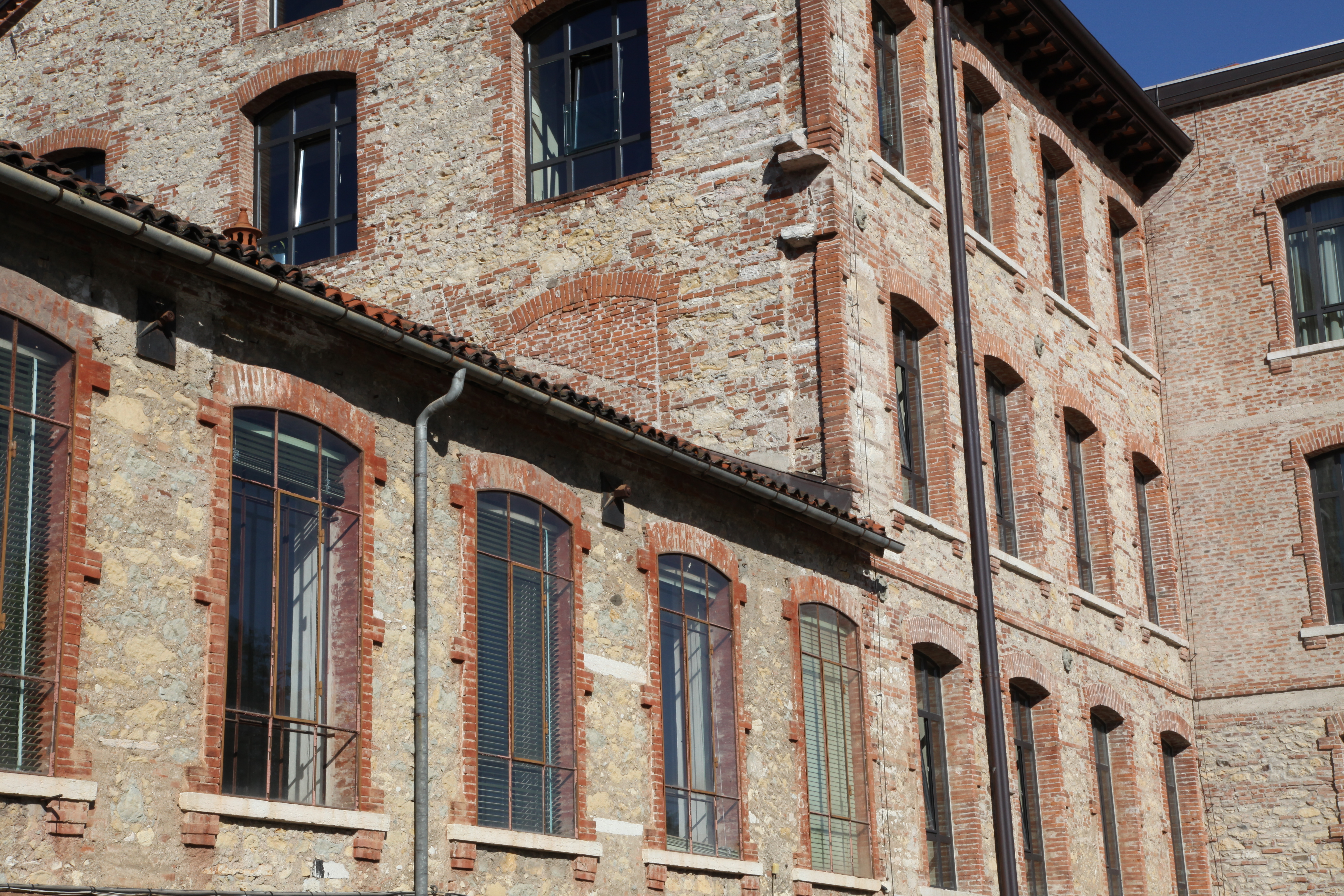 Facciata Lanificio Conte, primo piano e area "Shed" This is a photo of a monument which is part of cultural heritage of Italy.